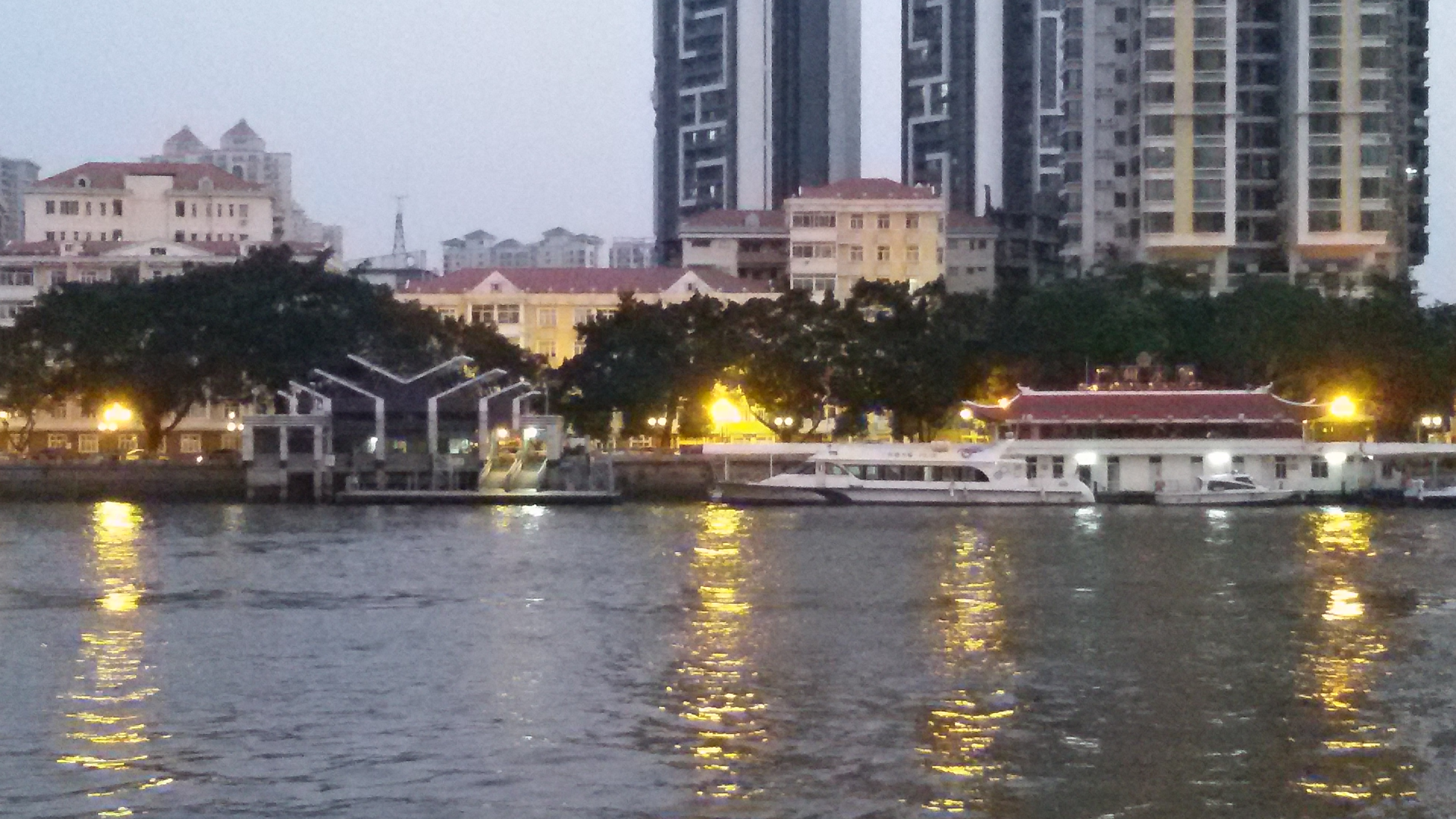 粵語: 海幢码头同广州水警署